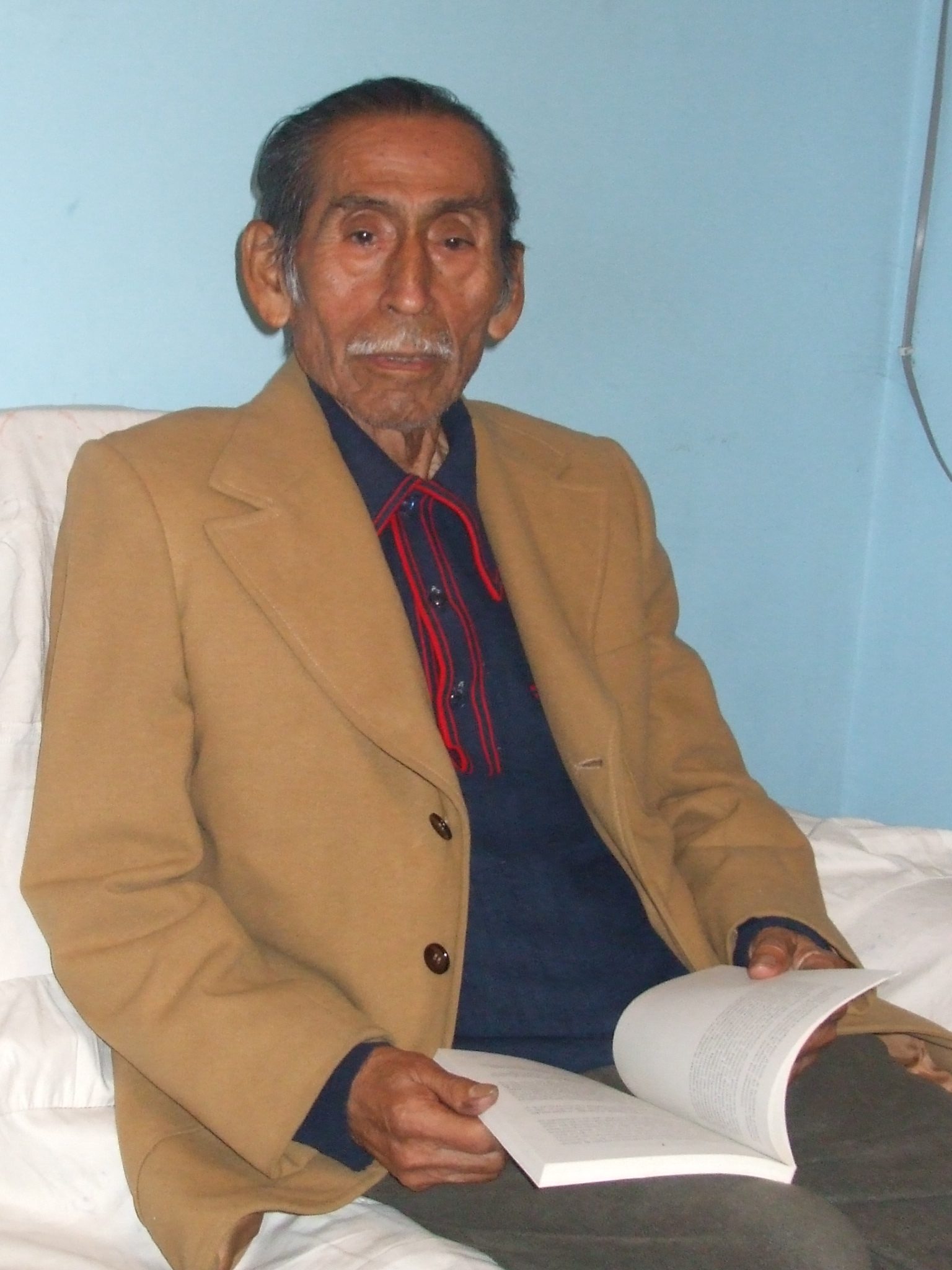 Escritor en su casa de San Luis